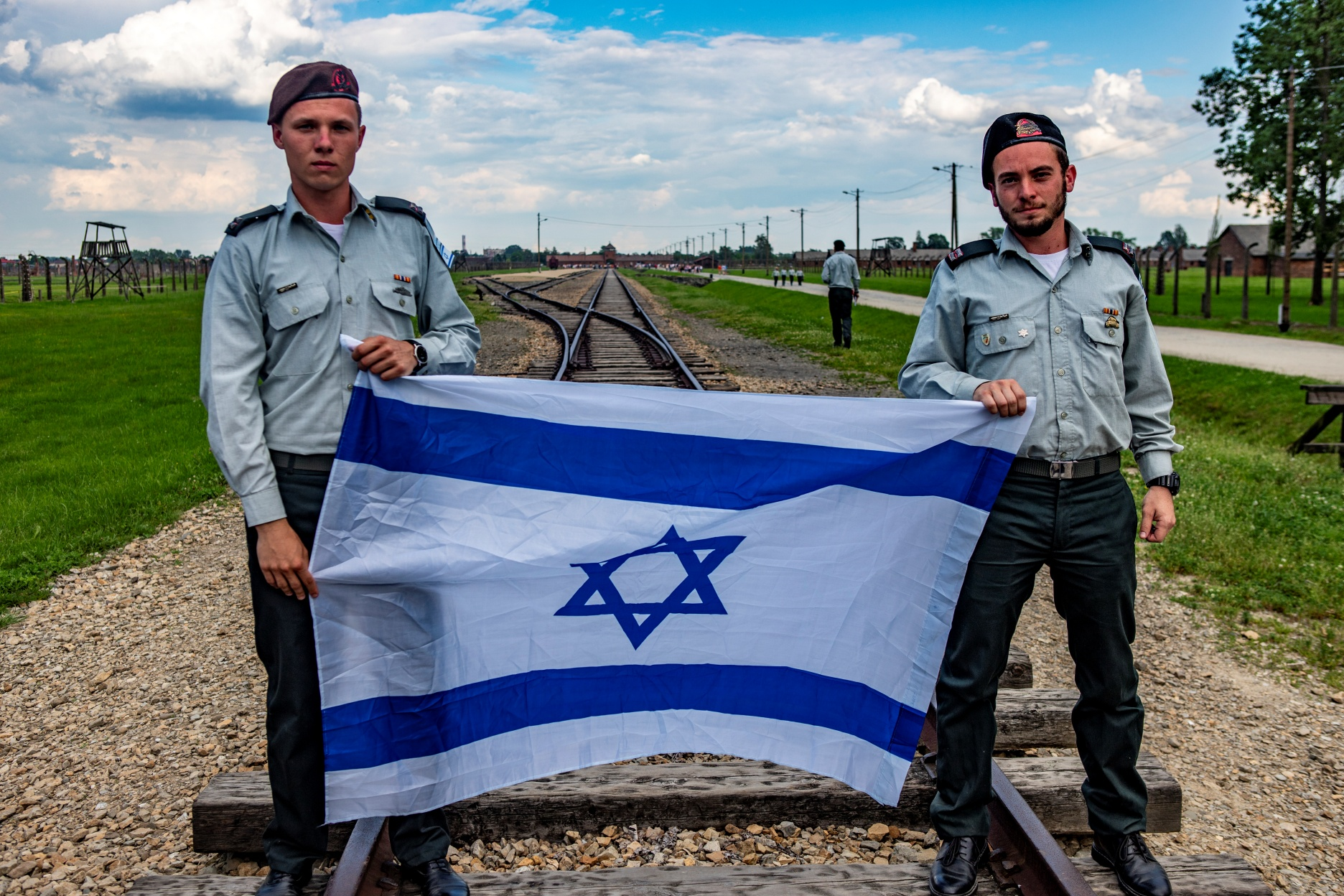 "עדים במדים" - מחנה ההשמדה אושוויץ